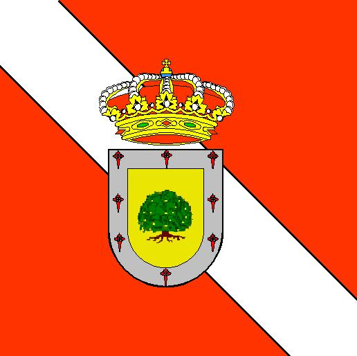 Template:Bandera de La Zarza, en Badajoz (España)